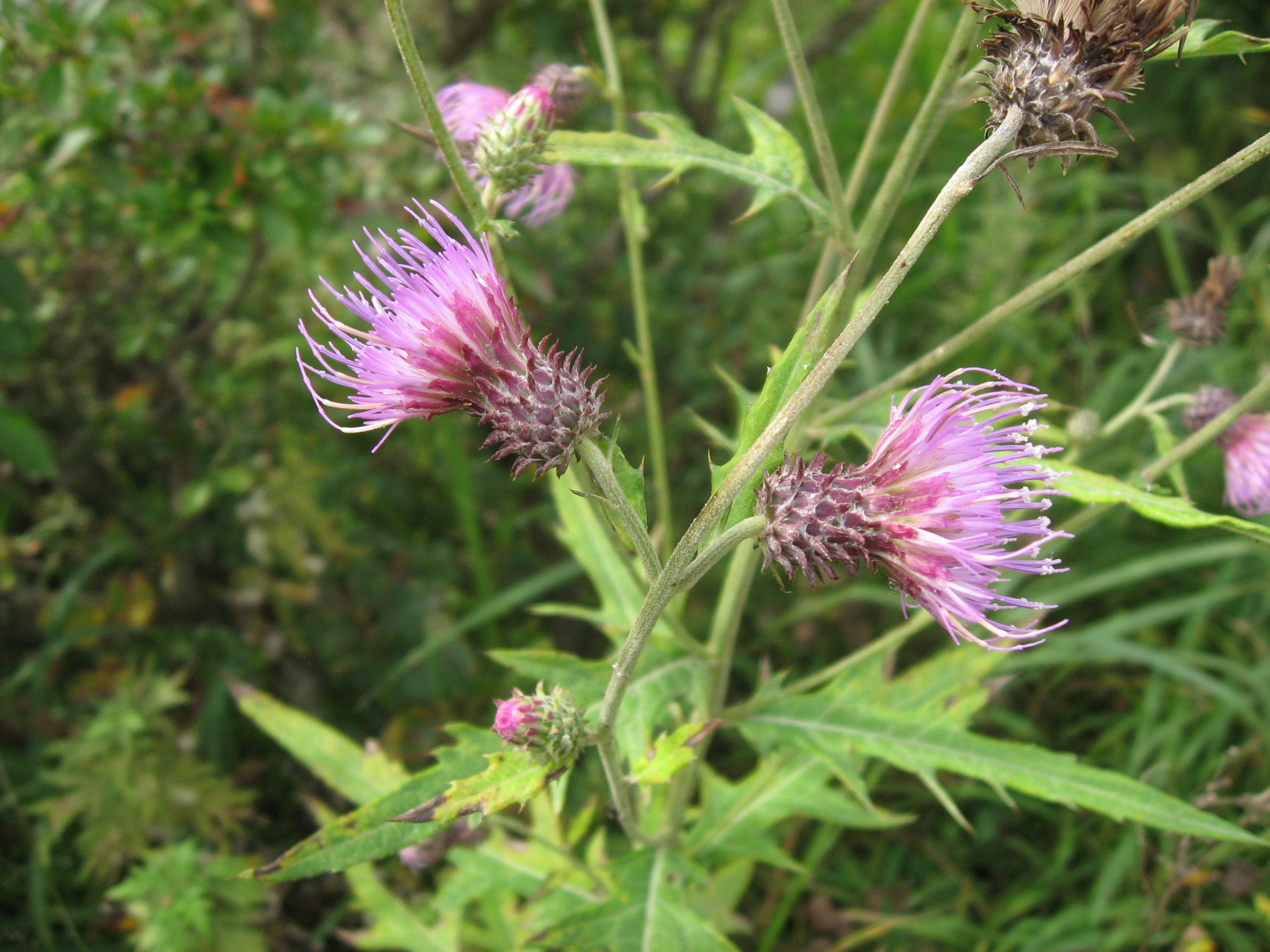 ナンブアザミ Cirsium nipponicum